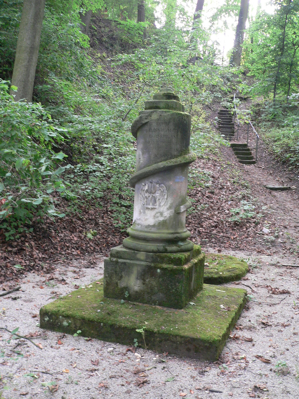 Grabmal der Gräfin Adrienne Elisabeth von Corneillan im Bergpark Schloss Falkenegg (Coburg)